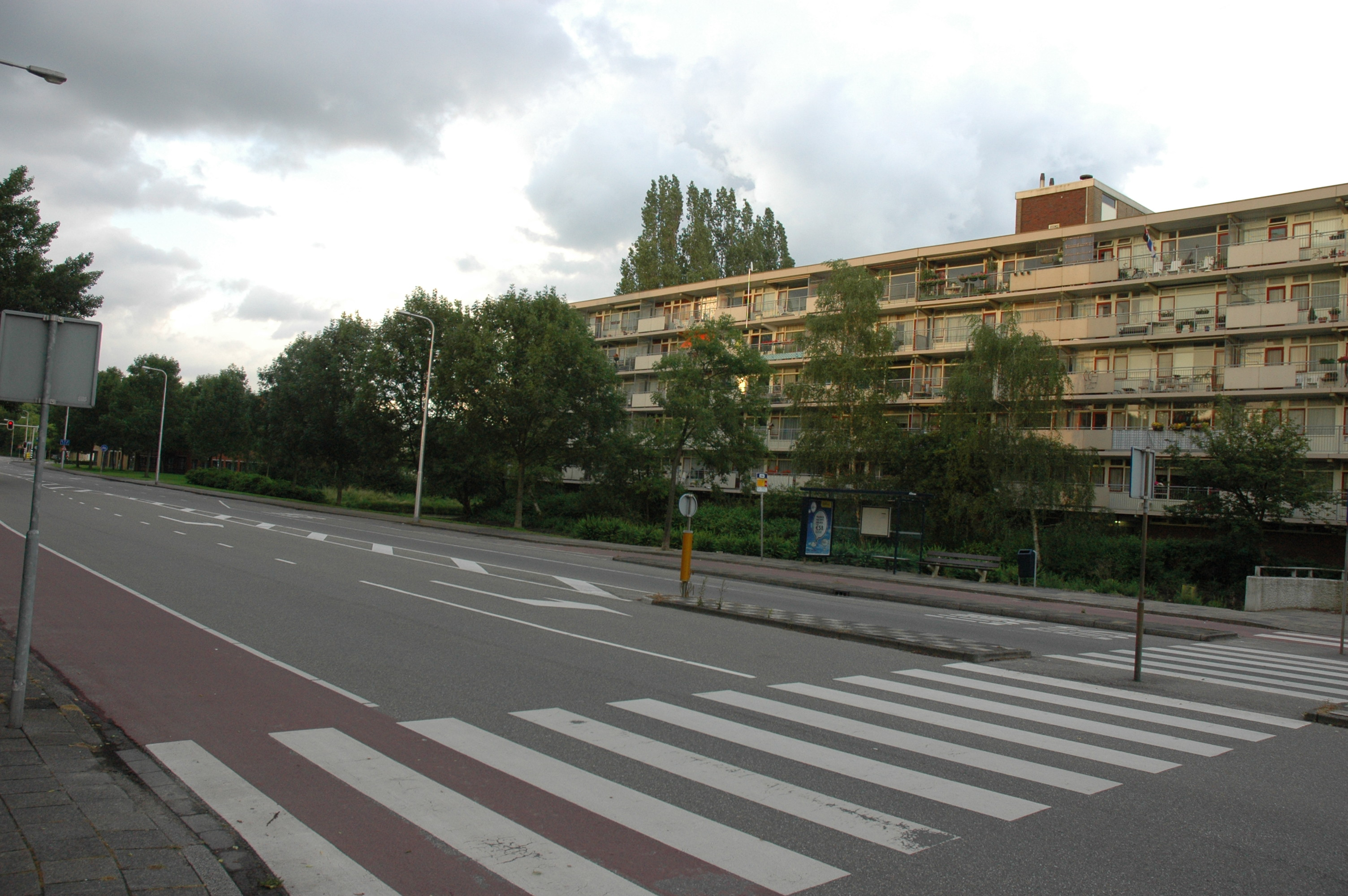 Groenelaan, Amstelveen, Netherlands